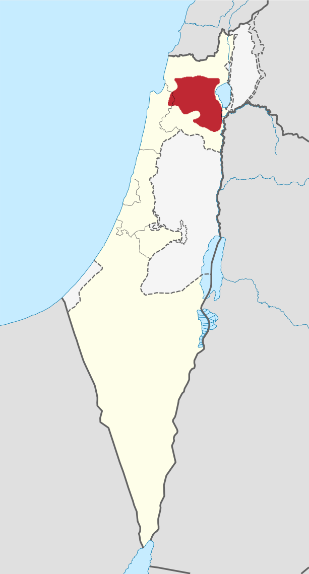 Lower Galilee region